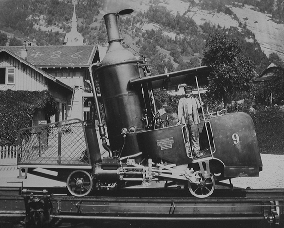 Une machine à vapeur du Rigi Bahnen.